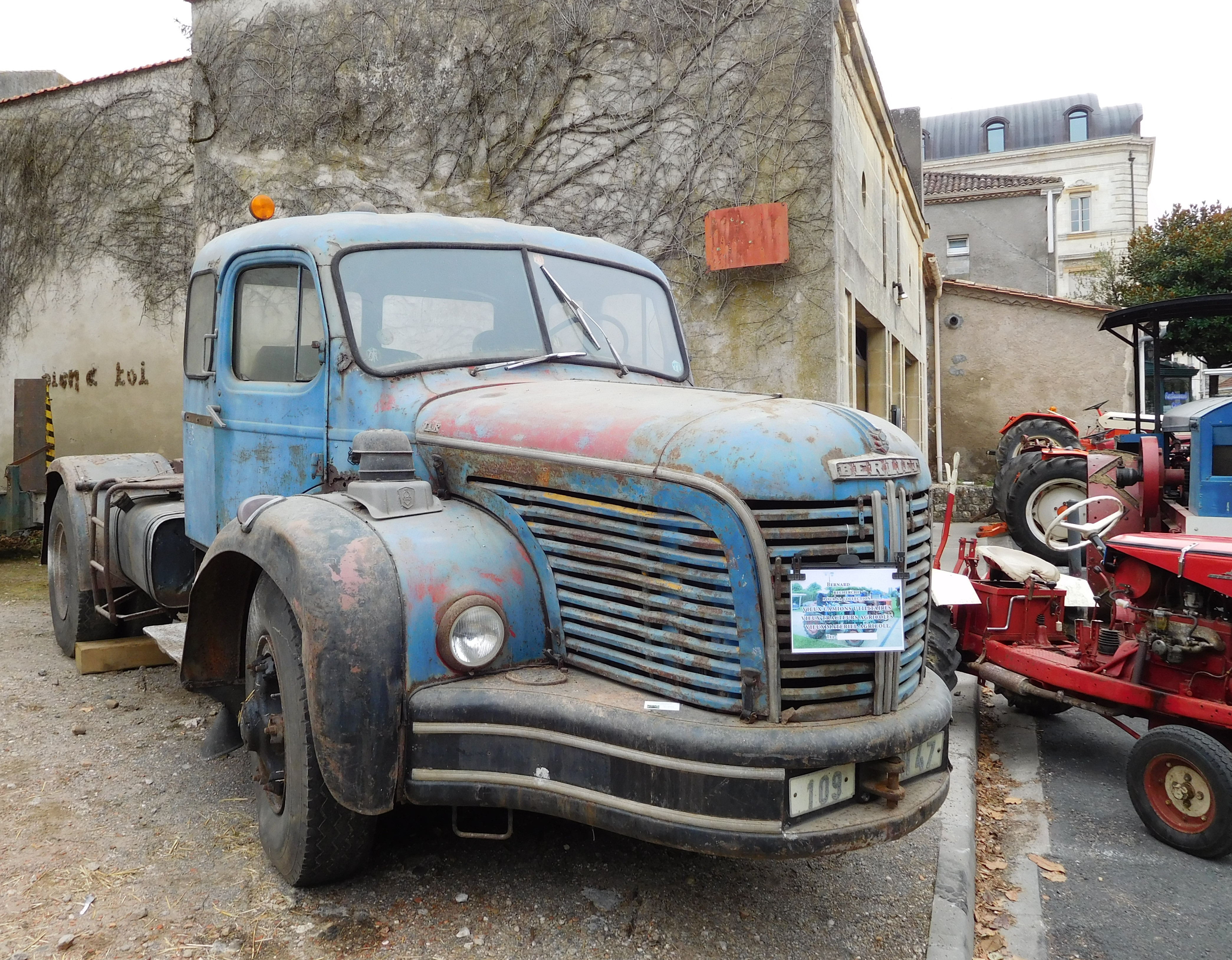 Camion Berliet TLR rouillé ; petite annonce.